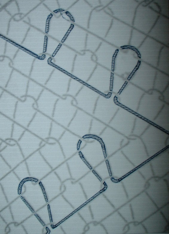 Atlas-Kettbindung